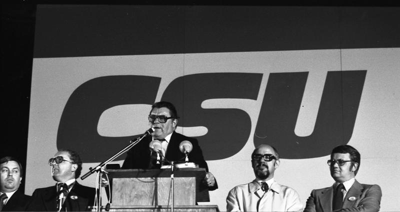 Bundestagswahlkundgebung der CSU auf dem Marienplatz in München mit CSU-Landesvorsitzendem Franz-Josef Strauss, Ministerpräsident Alfons Goppel und CSU-Generalsekretär Gerold Tandler